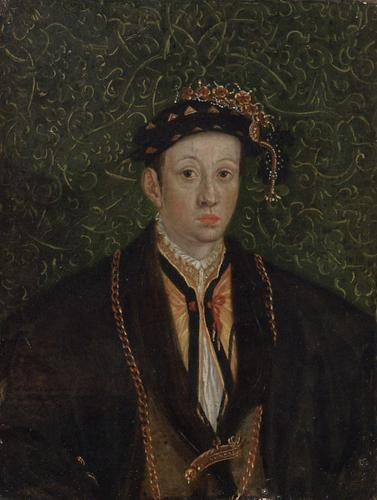 Künstler: anonym Kopie nach: Hans Besser Aachen - nach 1556 Heidelberg Gemälde: Christoph zu Rodemachern, Bruder d. Markgraf Philibert, gestorben 1575 s.d. Papier auf Holz 13,5 x 10 cm Kunsthistorisches Museum Wien, Gemäldegalerie Inv.-Nr. GG_4824 Abgebildete Person: Markgraf Christoph II. Sohn d. Bernhard IV. von Baden Baden-Rotenmachern